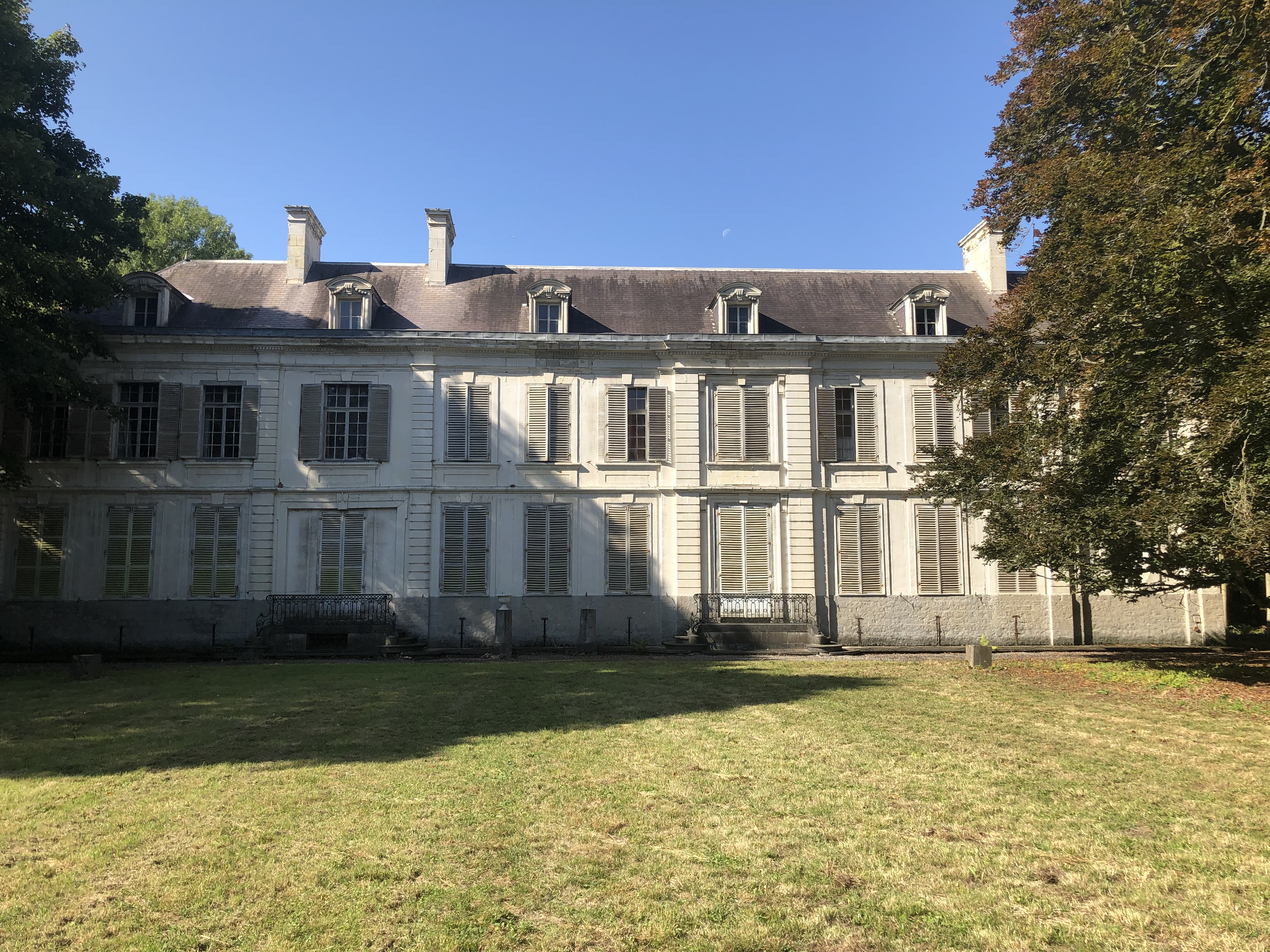 Face du château